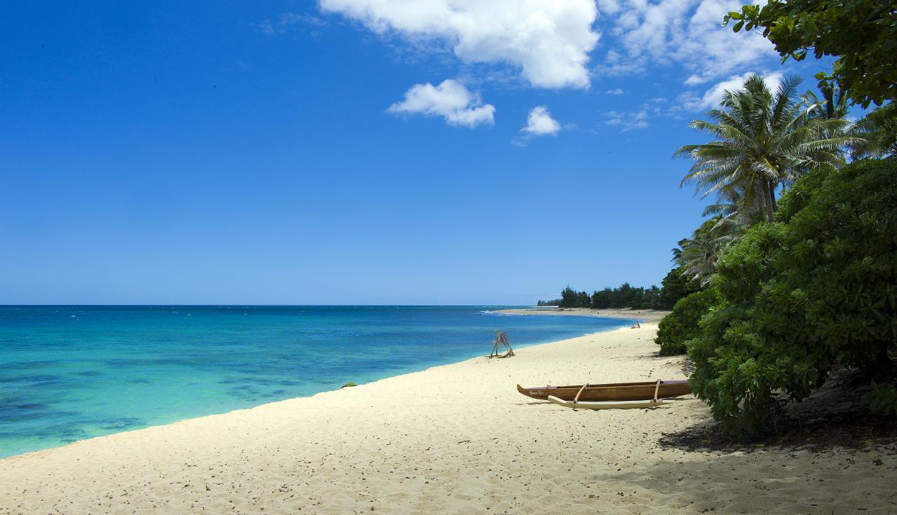 20100814_haleiwa_3861